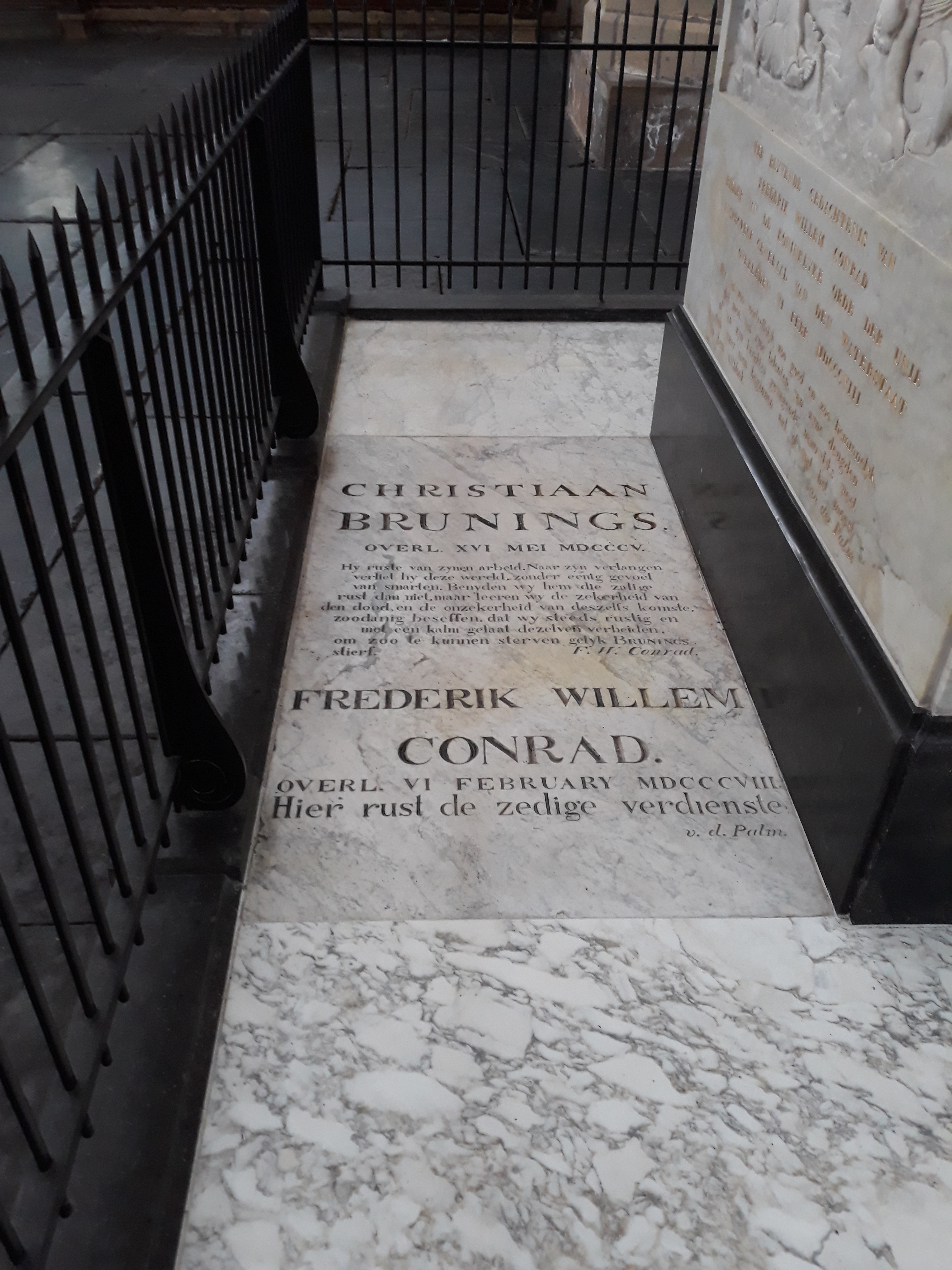 Das Grab des niederländischen Wasserbauingenieurs Frederik Willem Conrad in der Bavokirche von Haarlem.